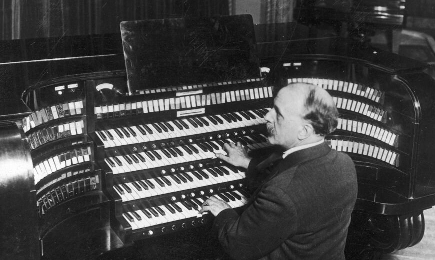 Louis Vierne aux claviers de l'orgue du Wanamaker Shop en février 1927.